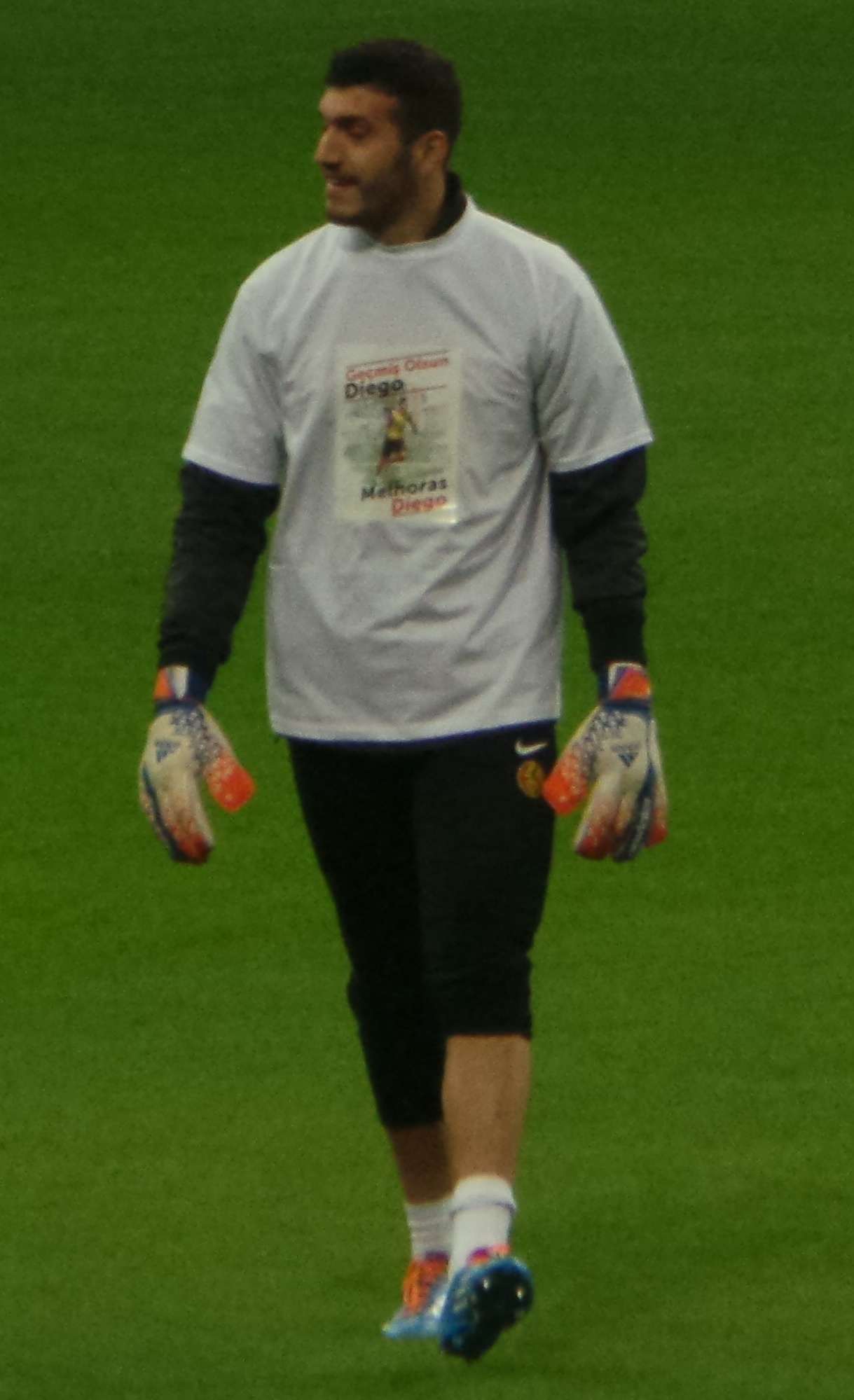 Kayacan Erdoğan